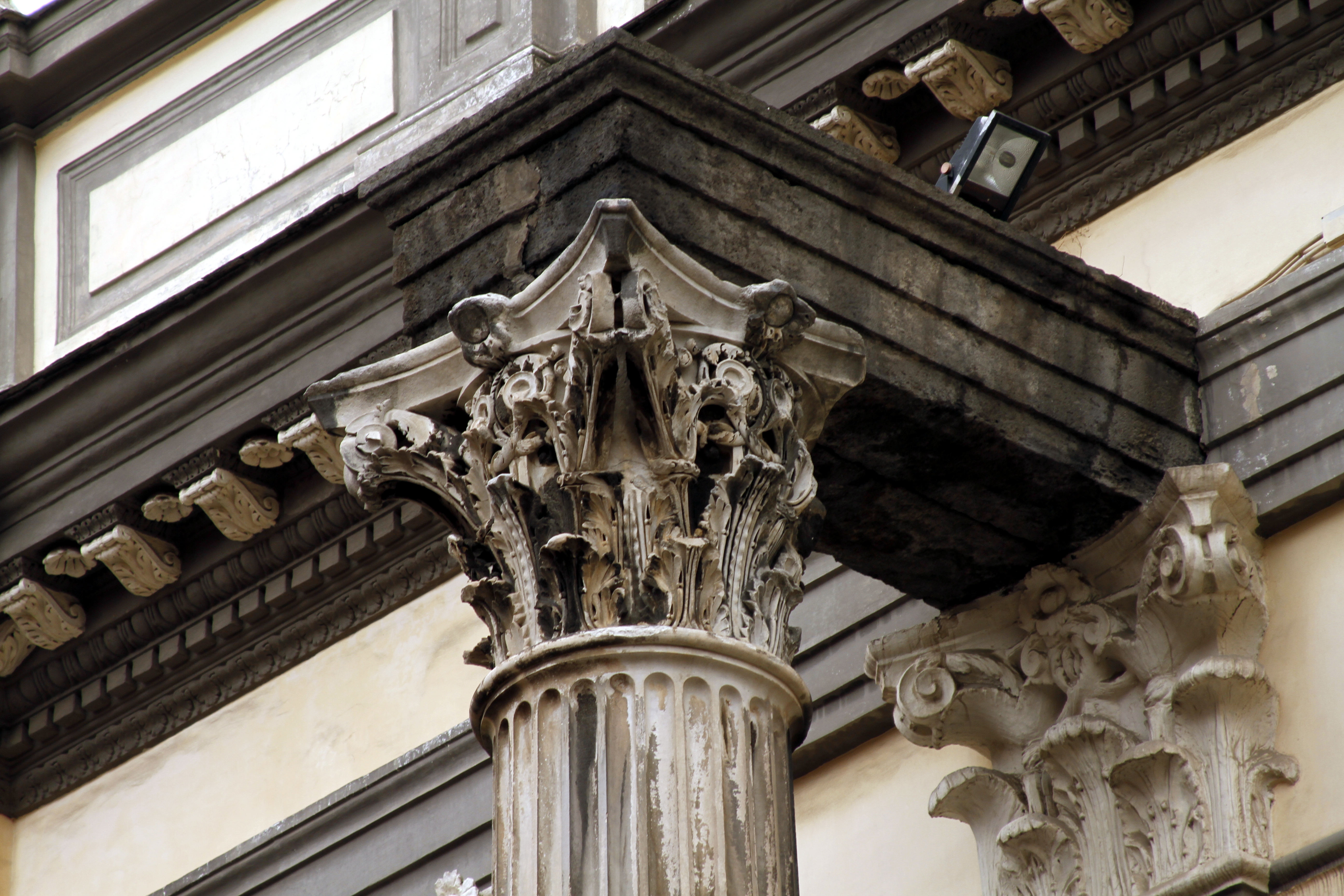 San Paolo Maggiore, Nápoles